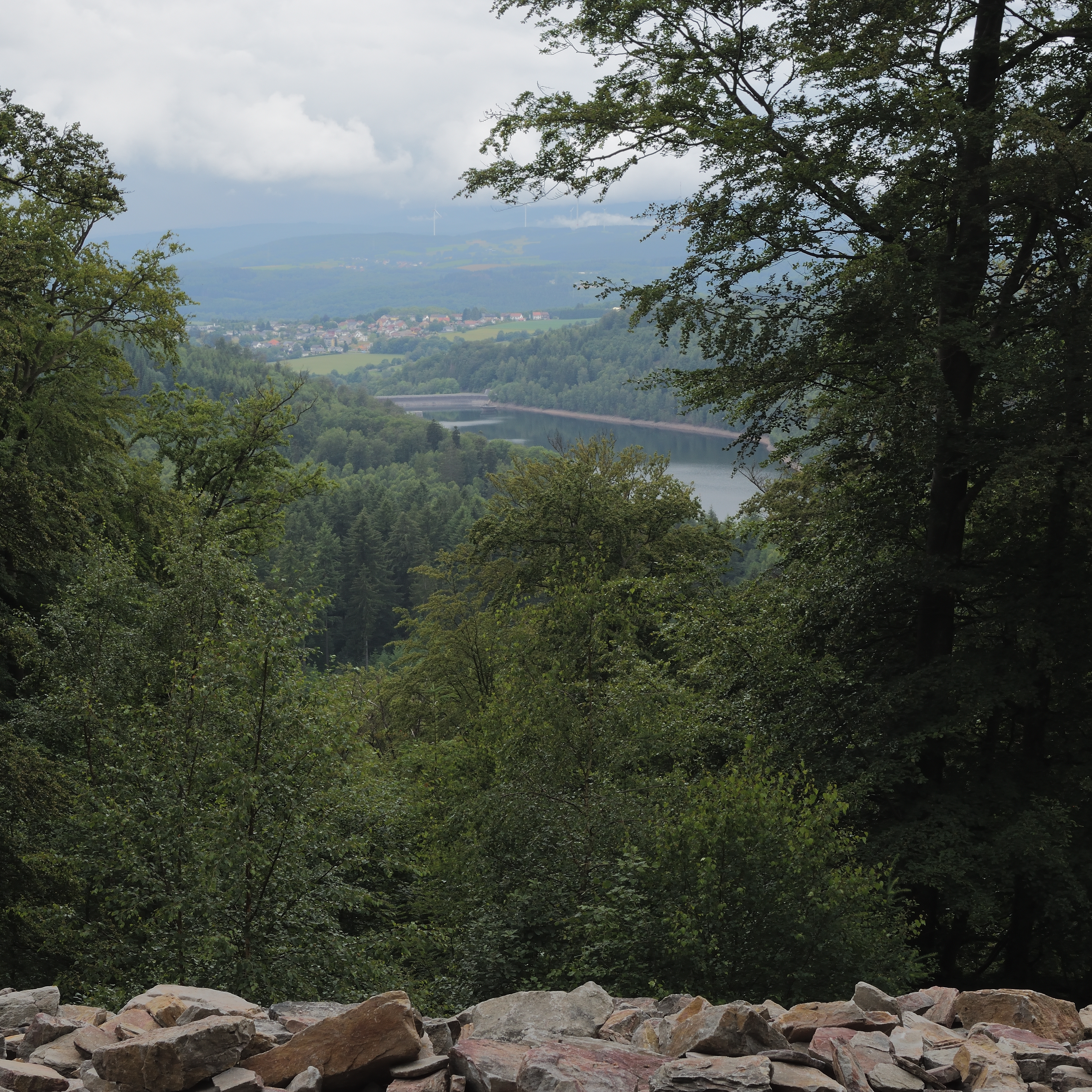 Keltenburg bei Otzenhausen, Blick über den Nonnweiler Stausee und Nonnweiler